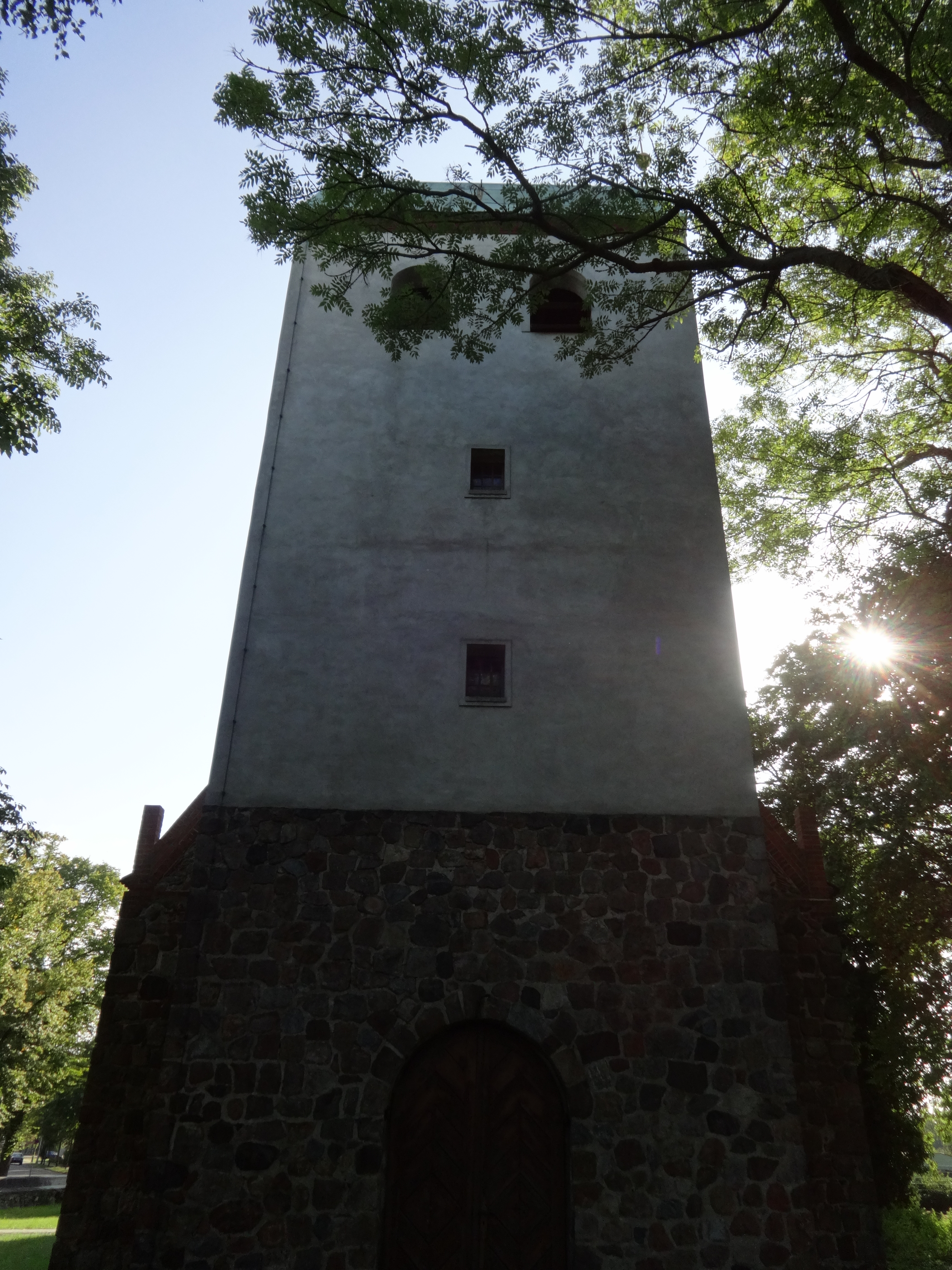 Die Feldsteinkirche in Waßmannsdorf wurde vermutlich in der Mitte des 13. Jahrhunderts errichtet wurde. 1926 kam der Westturm hinzu. In ihrem Innern steht unter anderem ein hölzerner Kanzelaltar aus dem Anfang des 18. Jahrhunderts.